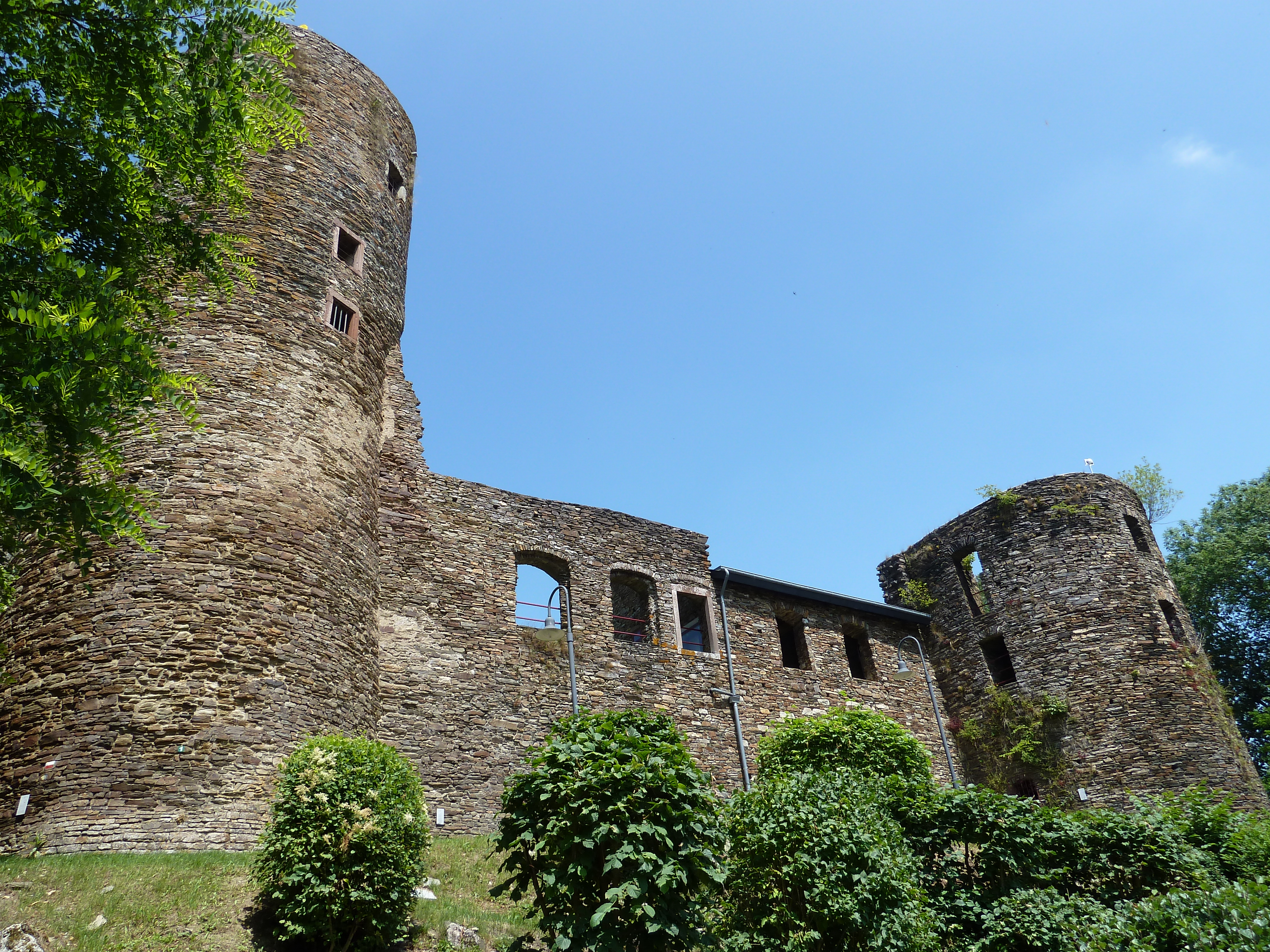 Burg Reuland, Reuland, Burg-Reuland, Belgien